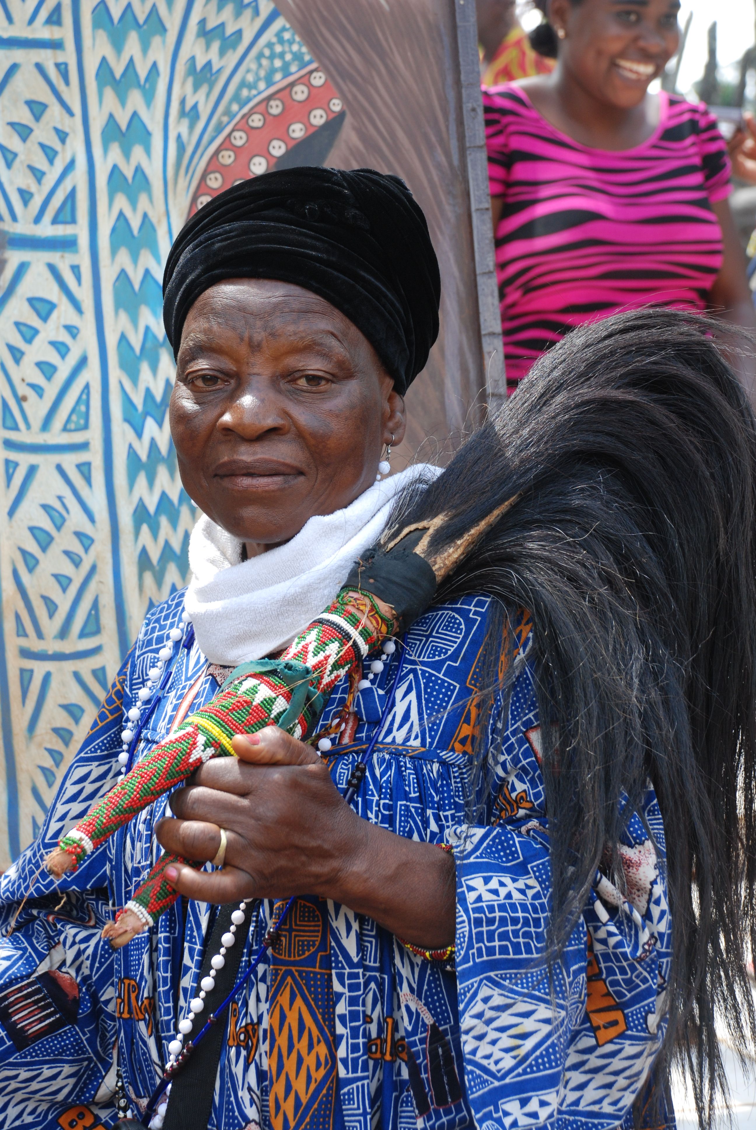 Tenue lors des funérailles This is an image of Cultural Fashion or Adornment from Cameroon